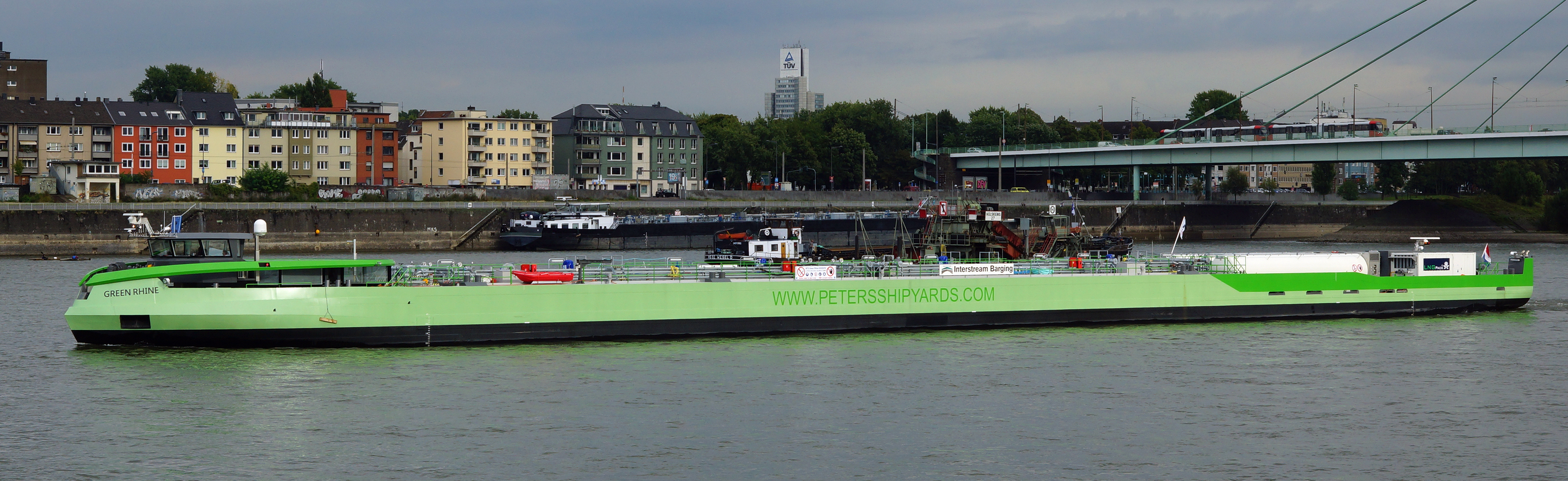 Das mit Flüssigerdgas angetriebene Tankmotorschiff Green Rhine in Köln.